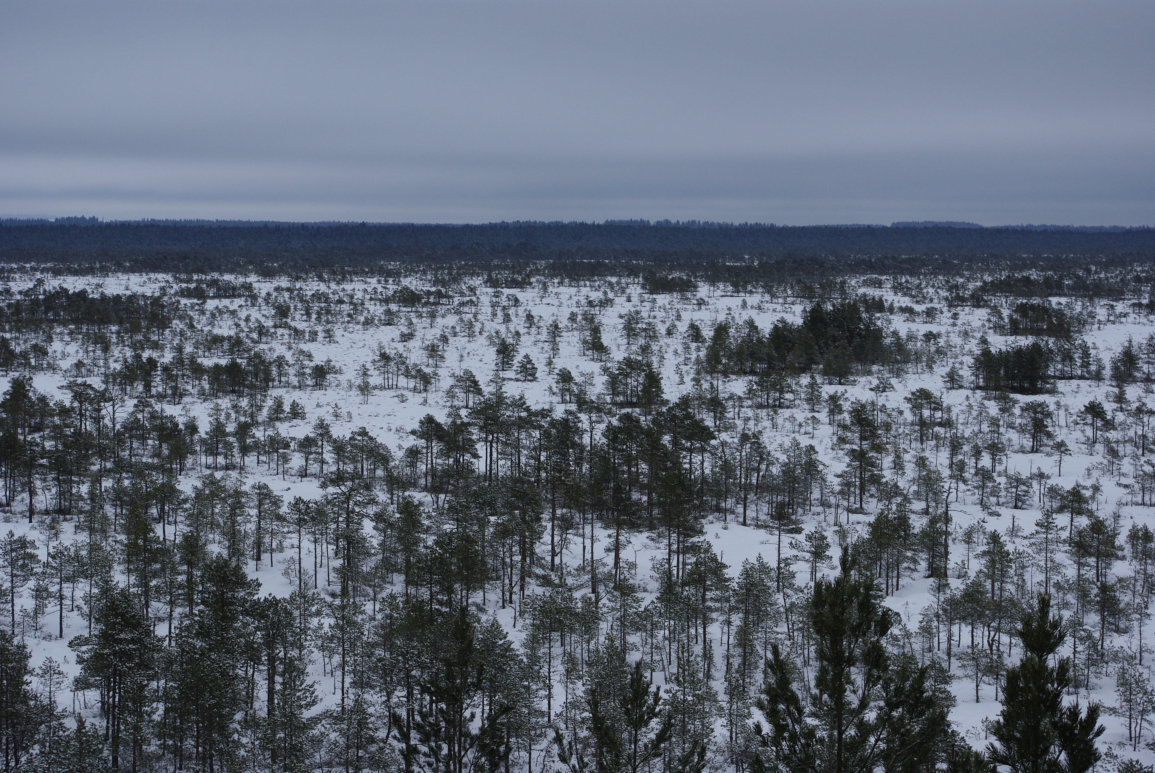 Kaasikjärve raba